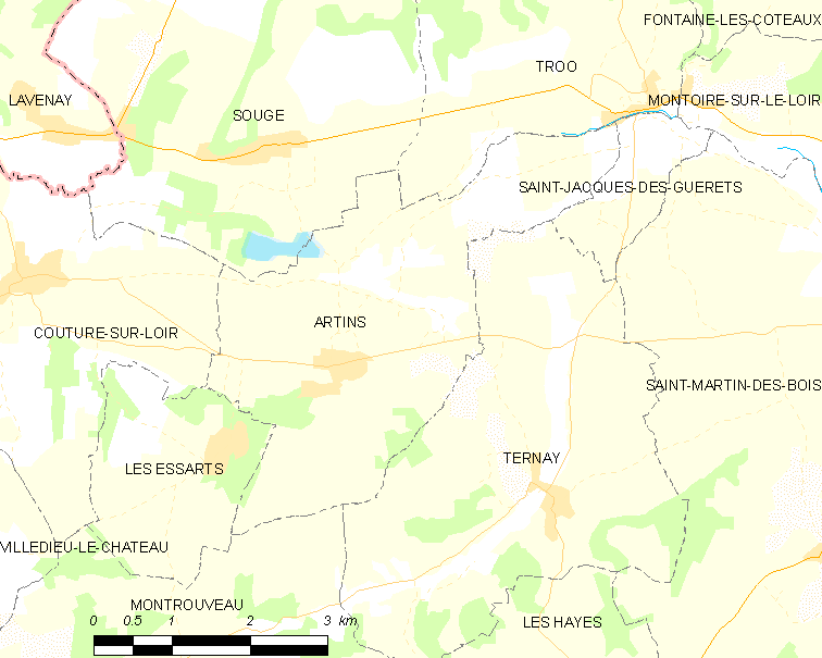 Carte des communes de France, centrée sur Artins (Loir-et-Cher, France, code Insee 41004)